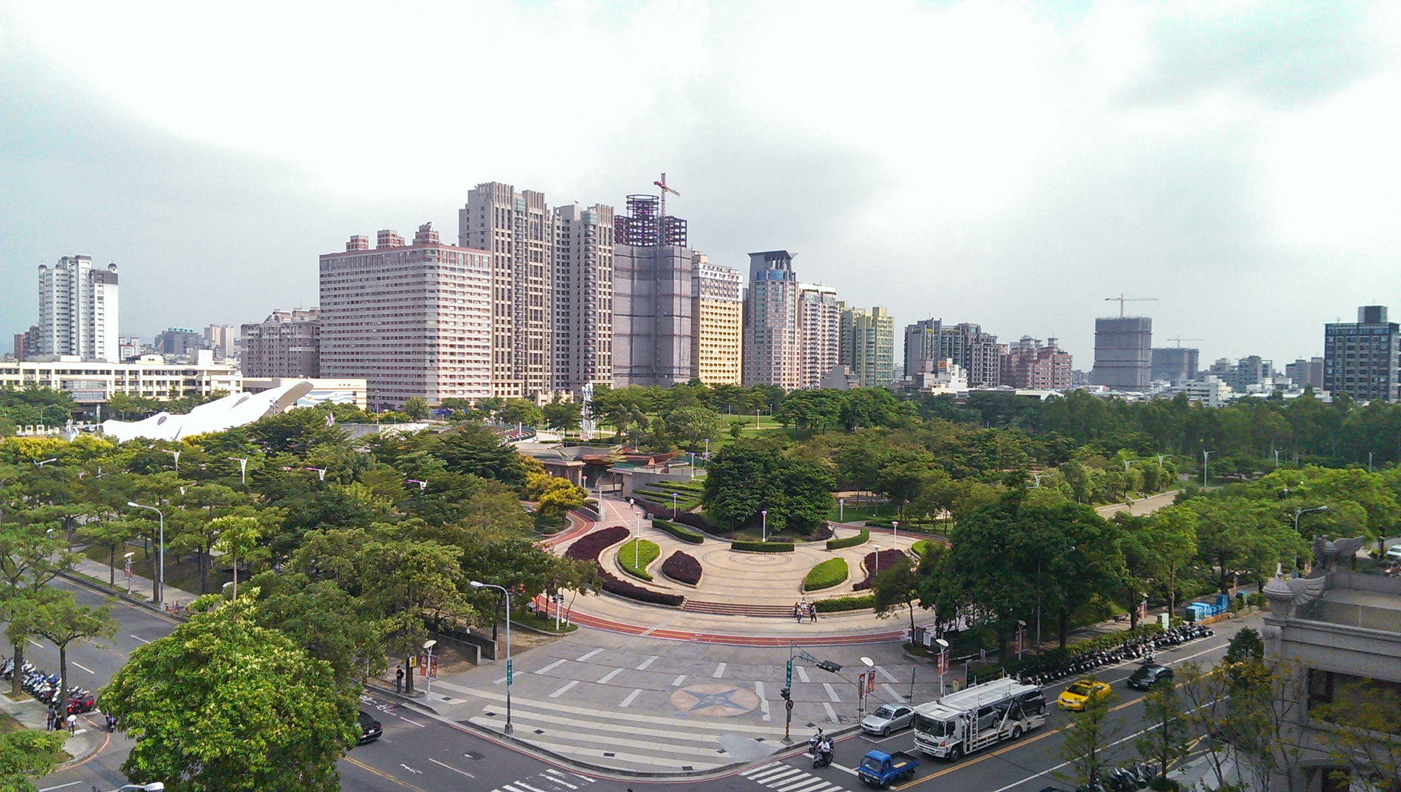 中文（台灣）: 文心森林公園